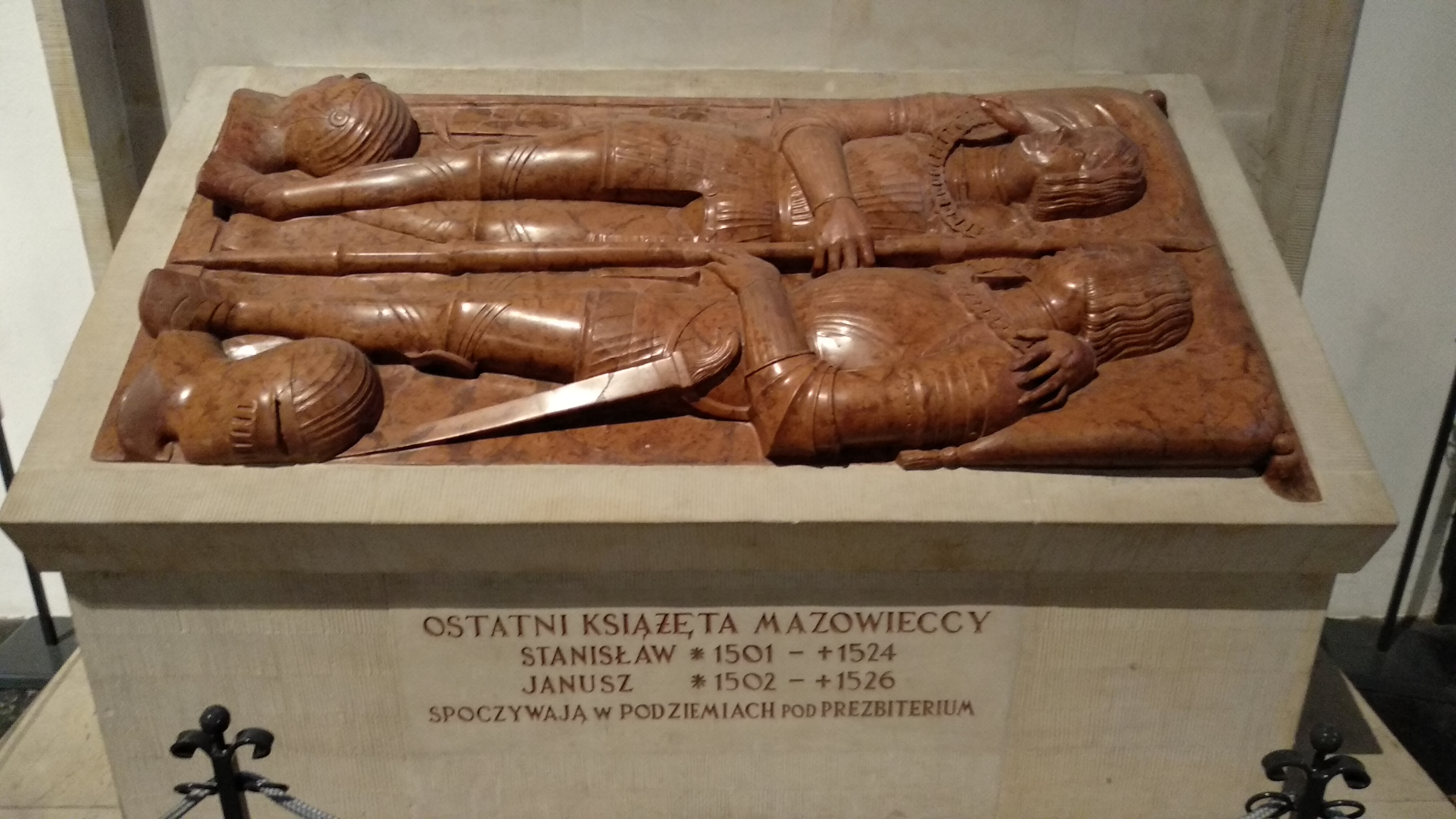 Nagrobek ostatnich książąt mazowieckich: Stanisława i Janusza III w Bazylice archikatedralnej św. Jana Chrzciciela w Warszawie.